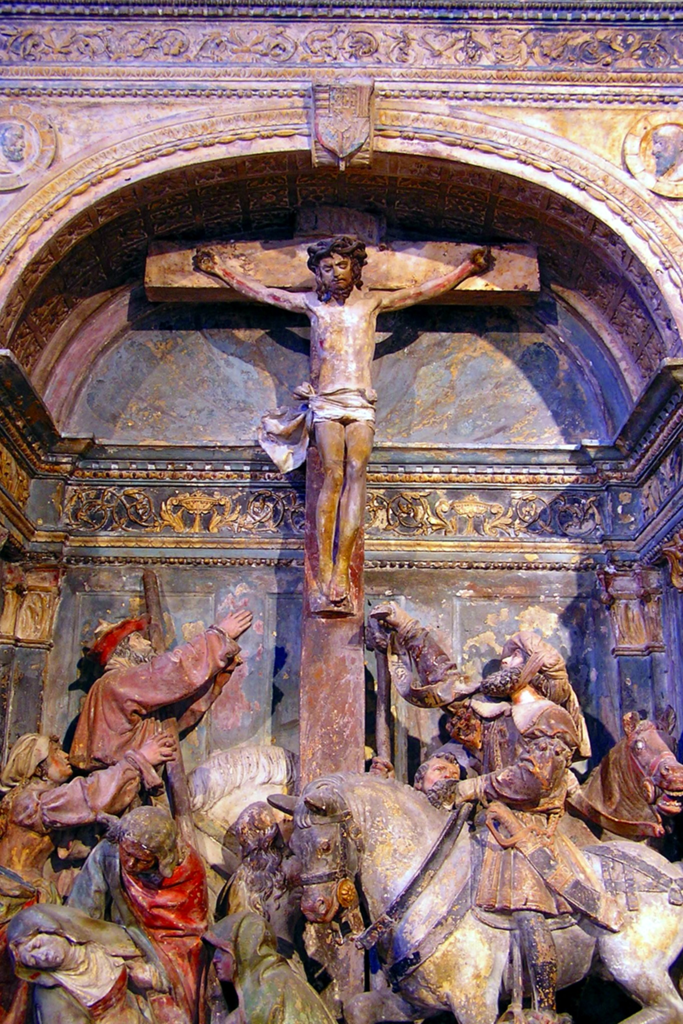 retable de l'église d'Hattonchatel (Ligier Richier)